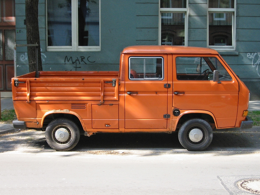 VW Transporter T3, Doppelkabine